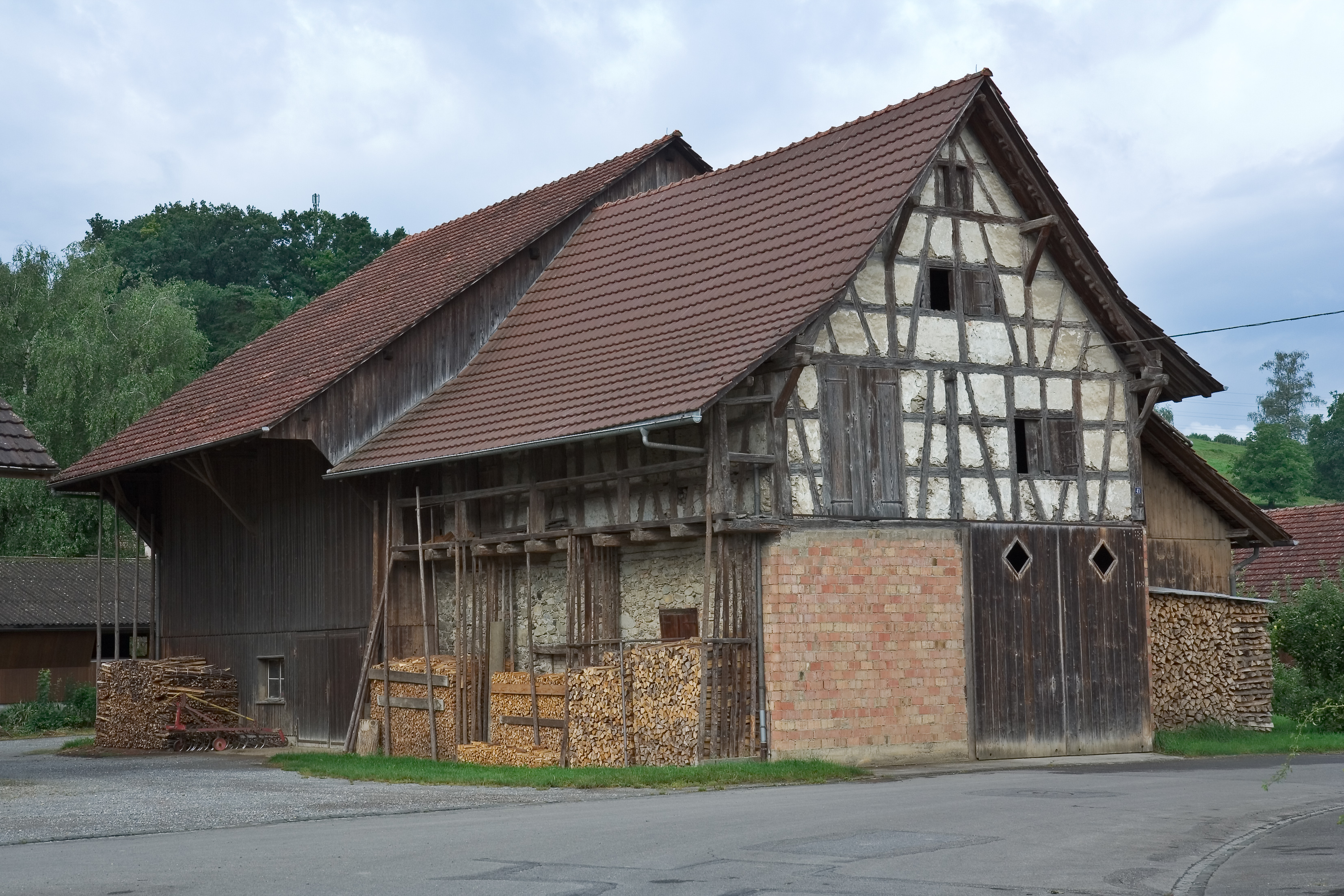 Eine zerfallende Scheune in Schlattingen